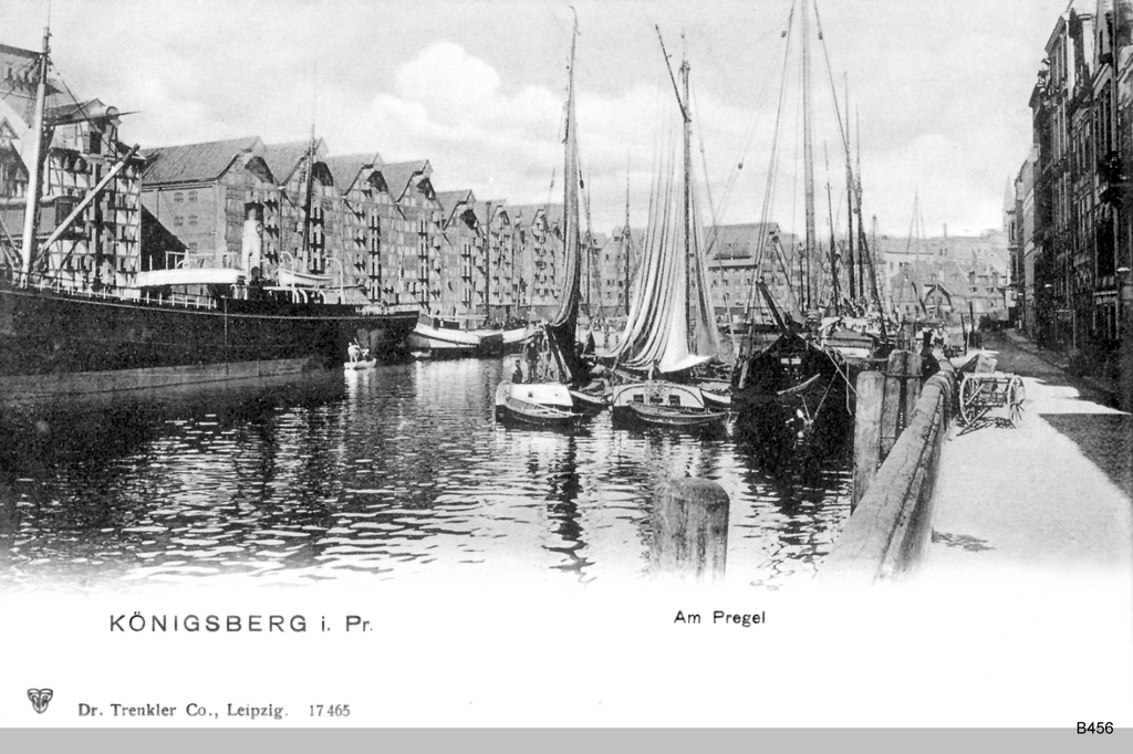 Königsberg